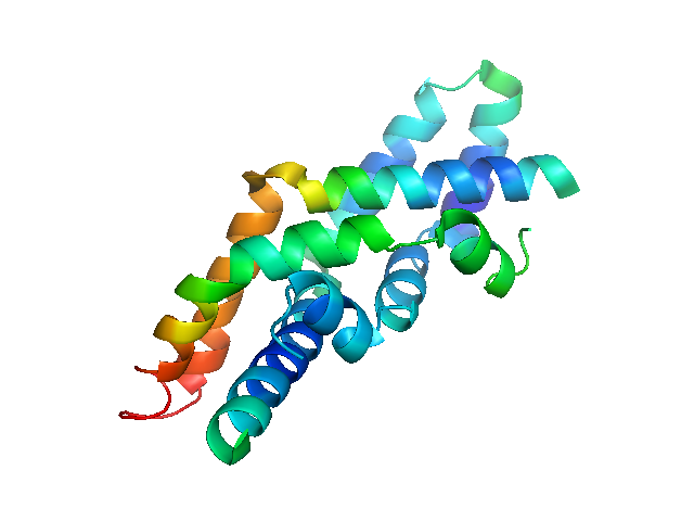 Saposin C Domain